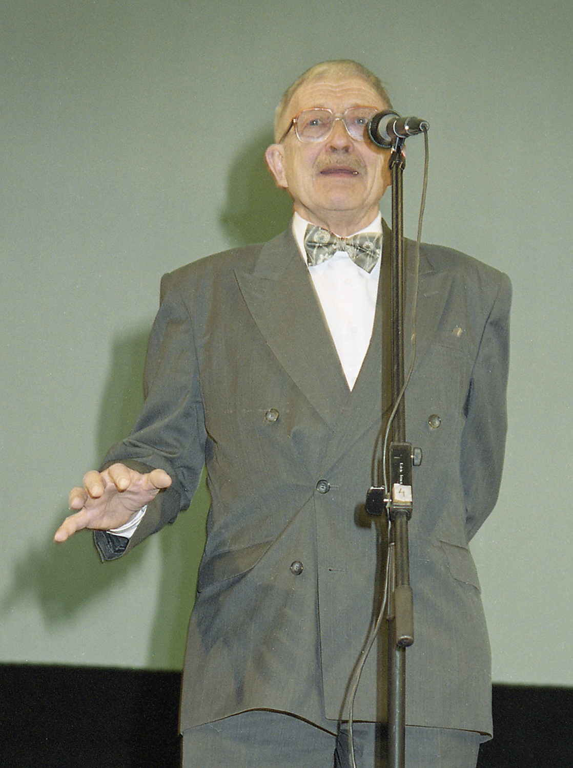 Erast Parmasto (seenevana) oli eesti mükoloog, ajakirja Loodus (97-01) aastapäeval 01